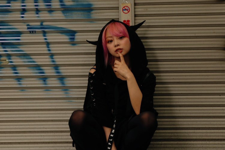 2020年7月4日 個別撮影会写真